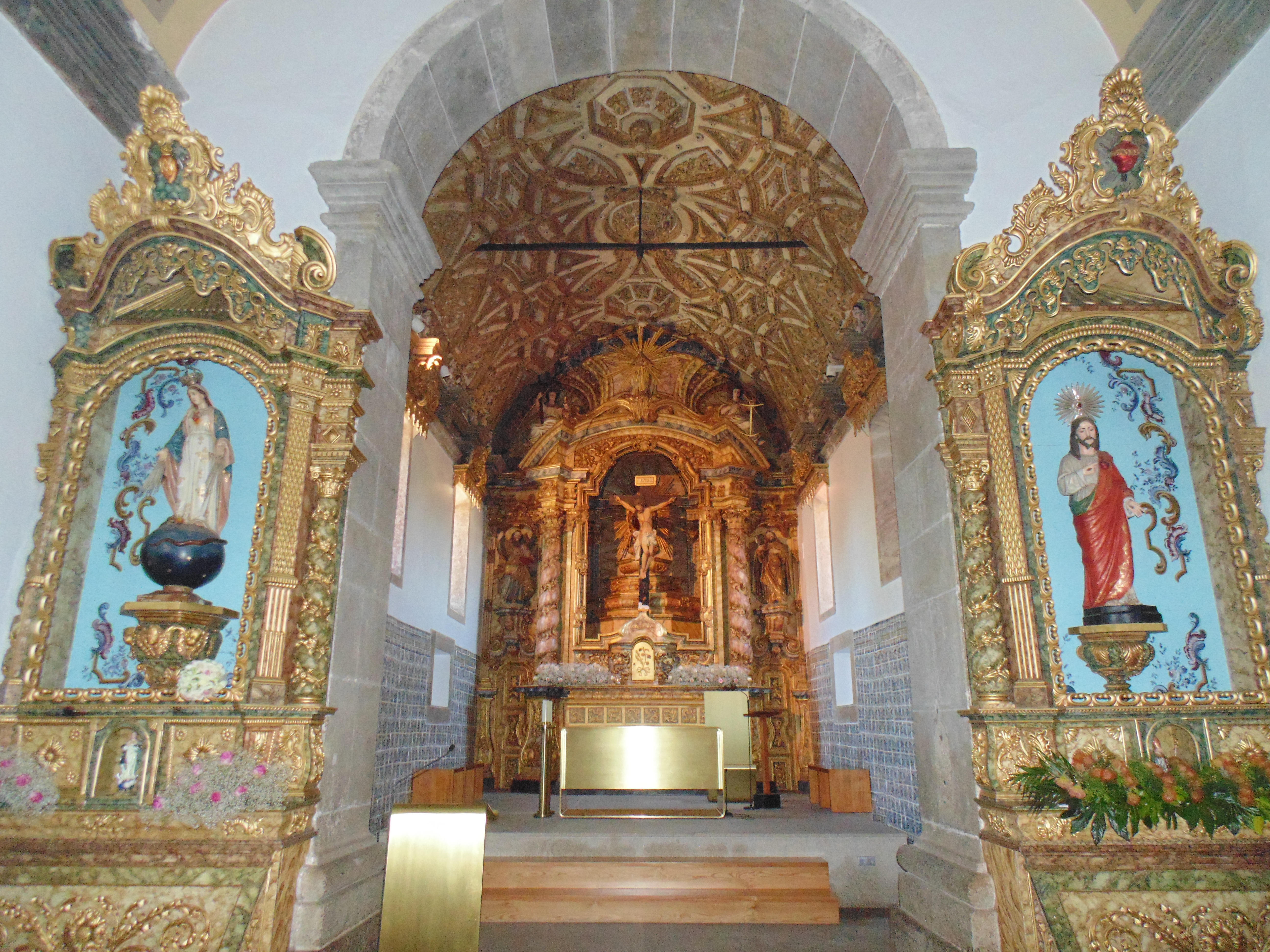 Interior da Igreja Matriz de Sobrado, destacando-se o altar-mor (séc. XVIII) e os retábulos laterais.